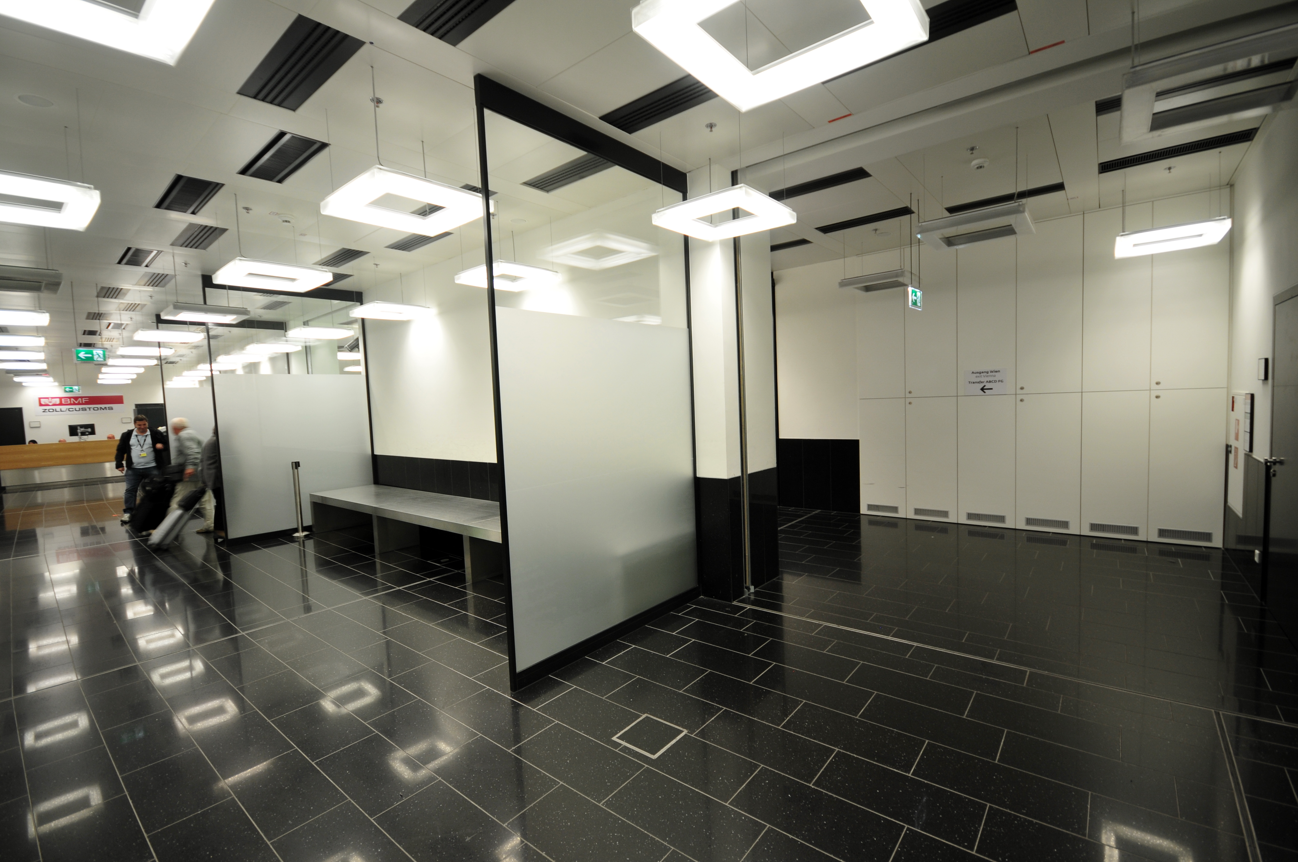 Landeanflug Wien-Schwechat